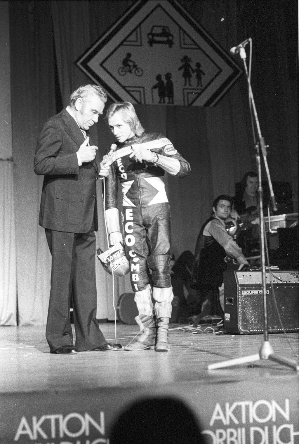 Abschlussfeier in der Ostseehalle. Auf der Bühne der Showmaster Peter Frankenfeld (links) und der frischgebackene Sandbahn-Weltmeister Egon Müller (rechts).